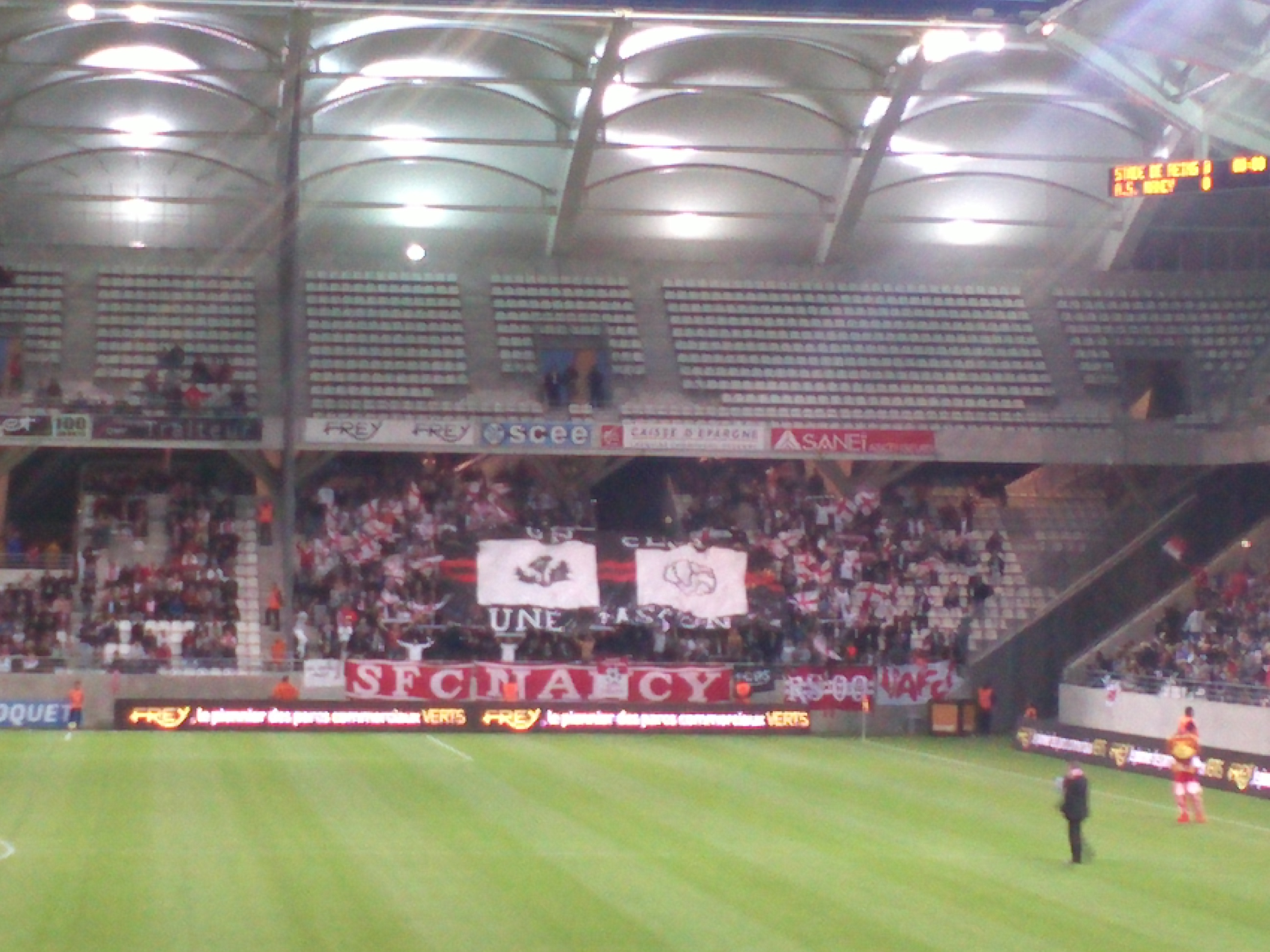 Supporters nancéiens lors du déplacement à Reims.